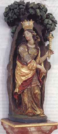 Edigna von Puch. Statue in der Kirche St. Sebastian in Puch neben der Edignalinde.